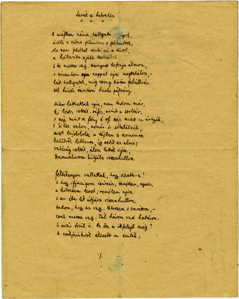 Radnóti Miklós Levél a hitveshez című művének (1944) kézirata.